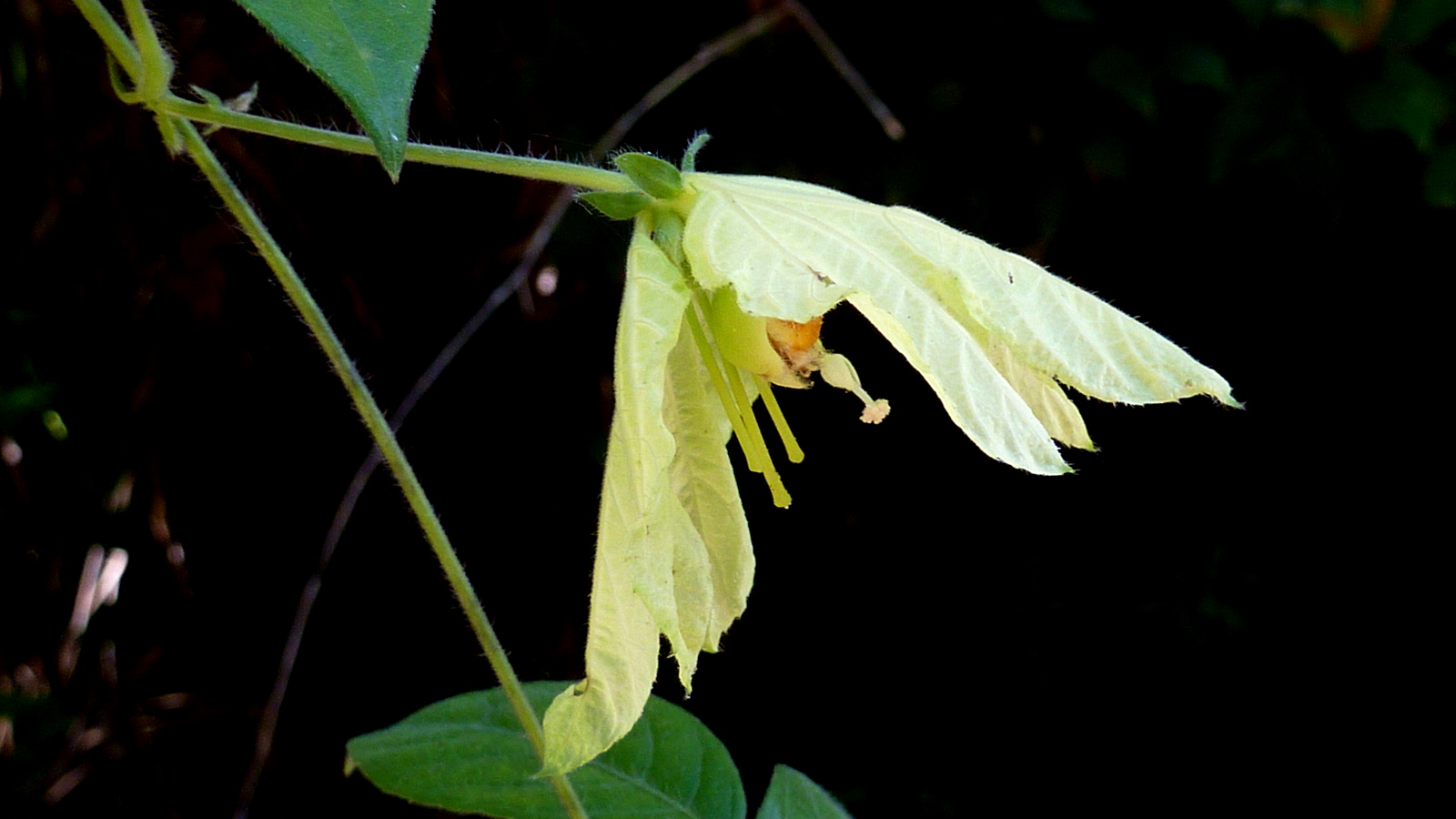 Dalechampia peckoltiana Müll. Arg.